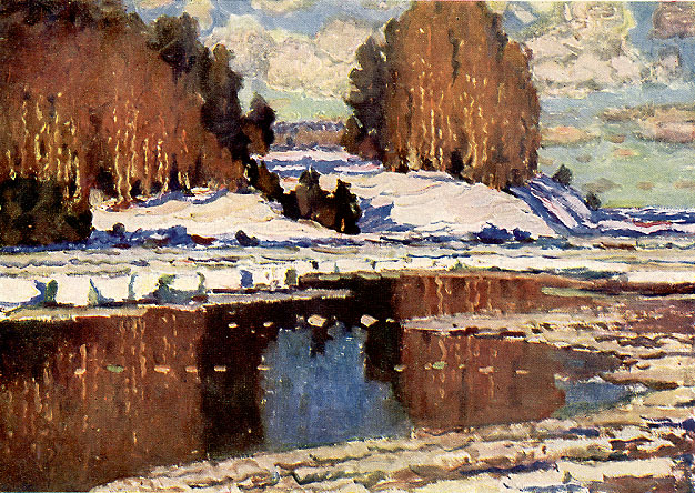 Pavasaris